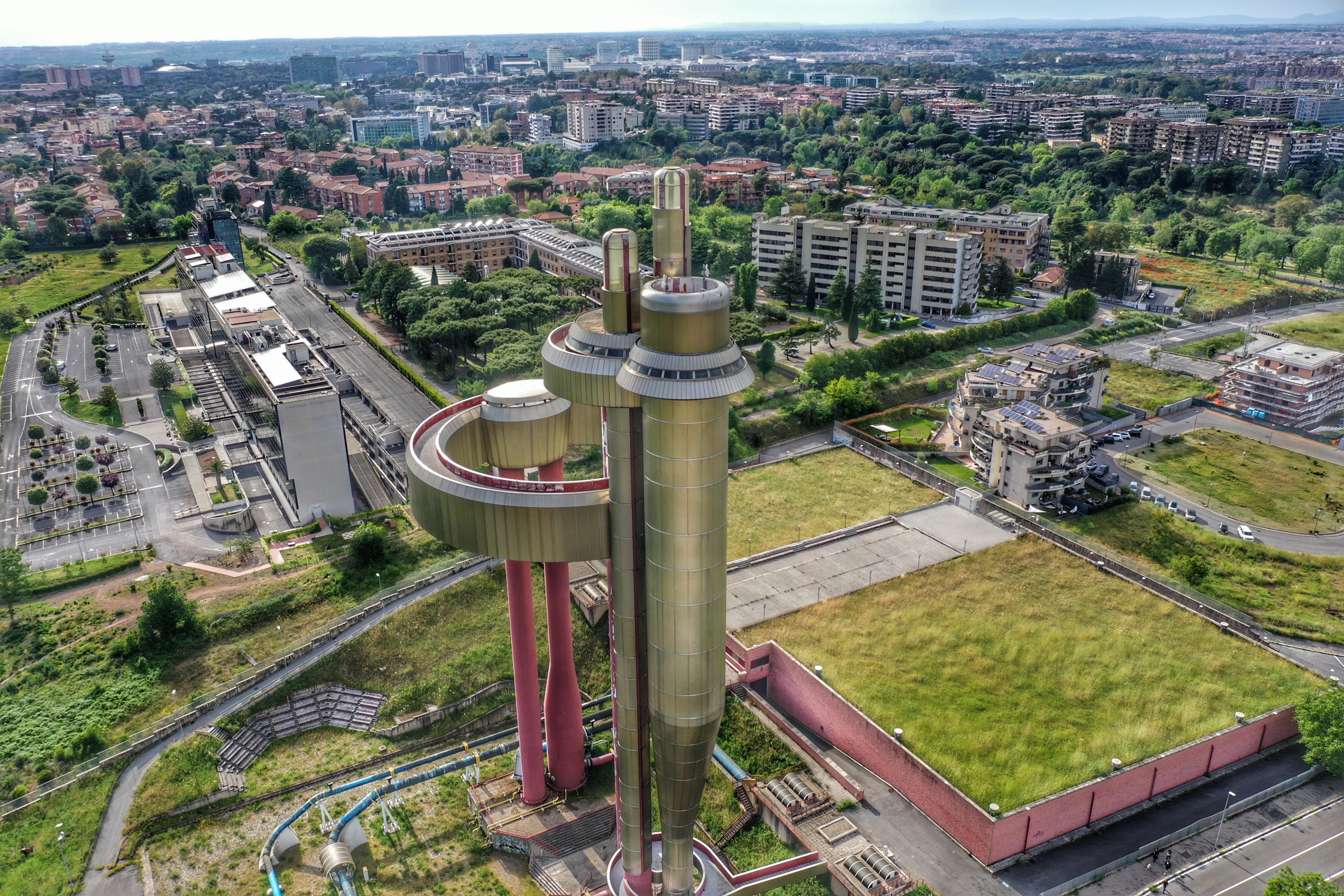 Fotografia scattata con drone della torre piezometrica del Centro Idrico EUR di Roma